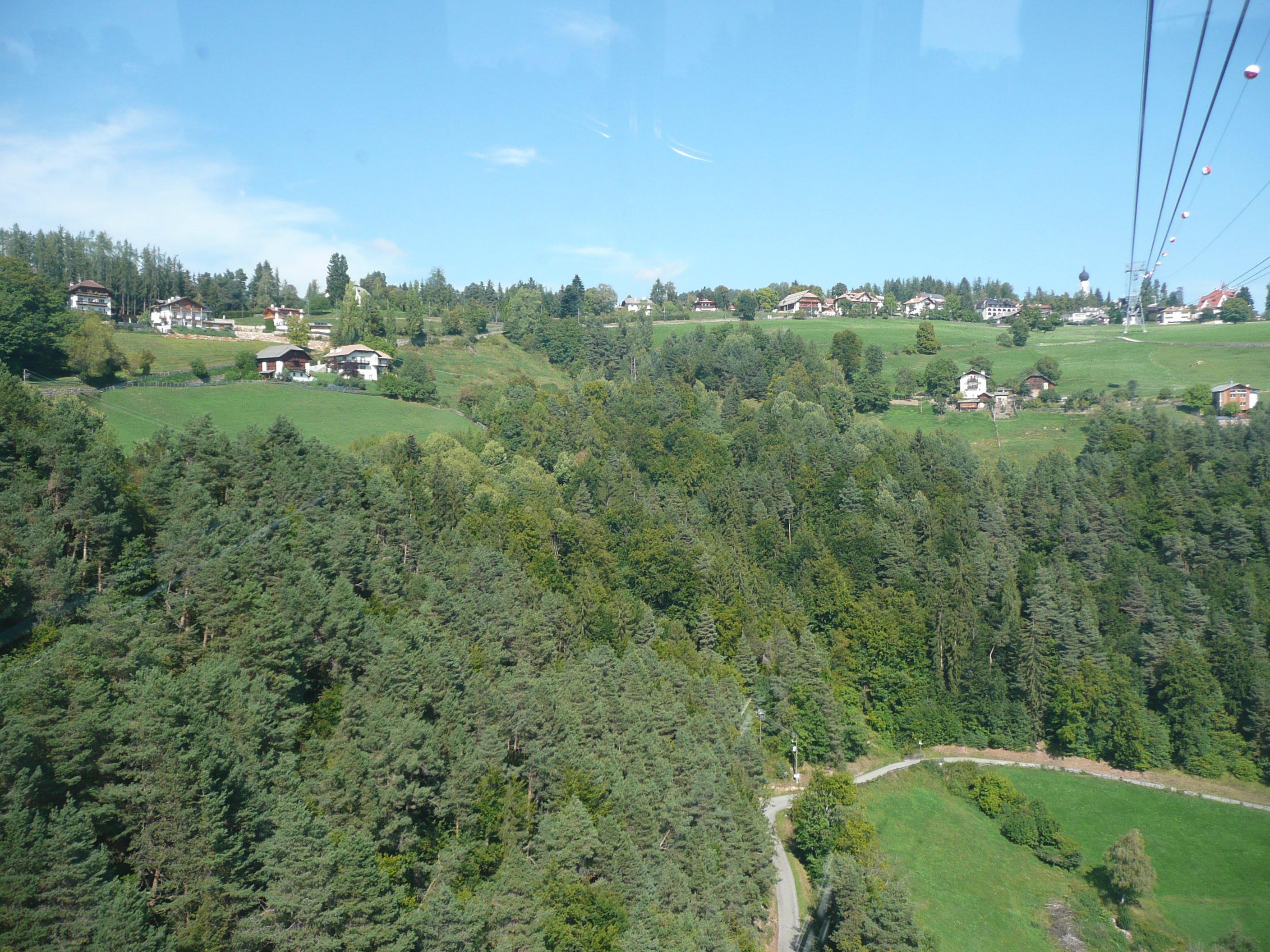 Blick auf Oberbozen von der Rittner Seilbahn aus